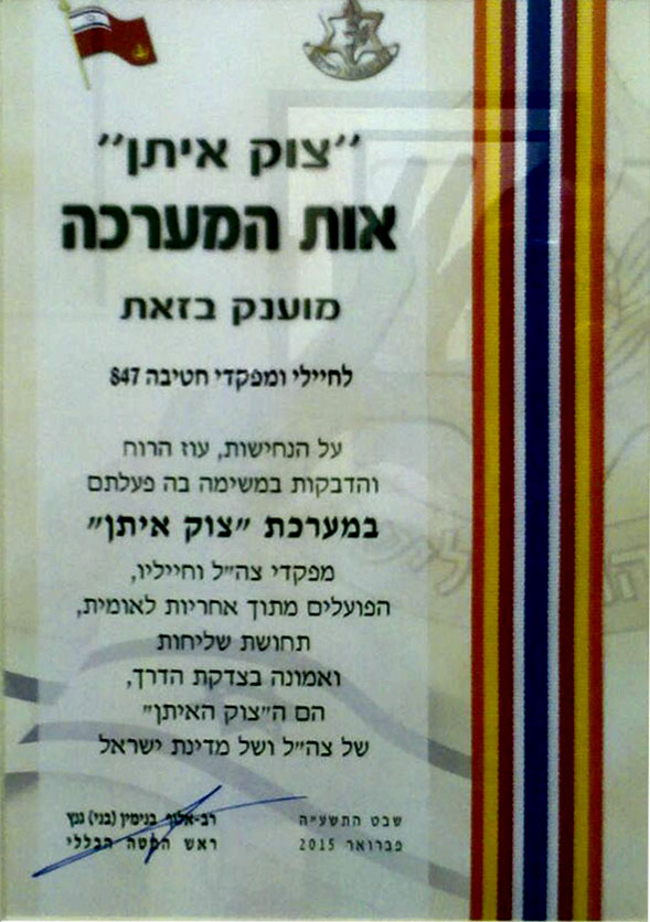 תעודת אות מערכה ללוחמי חטיבת מרכבות הפלדה שהשתתפו במבצע צוק איתן